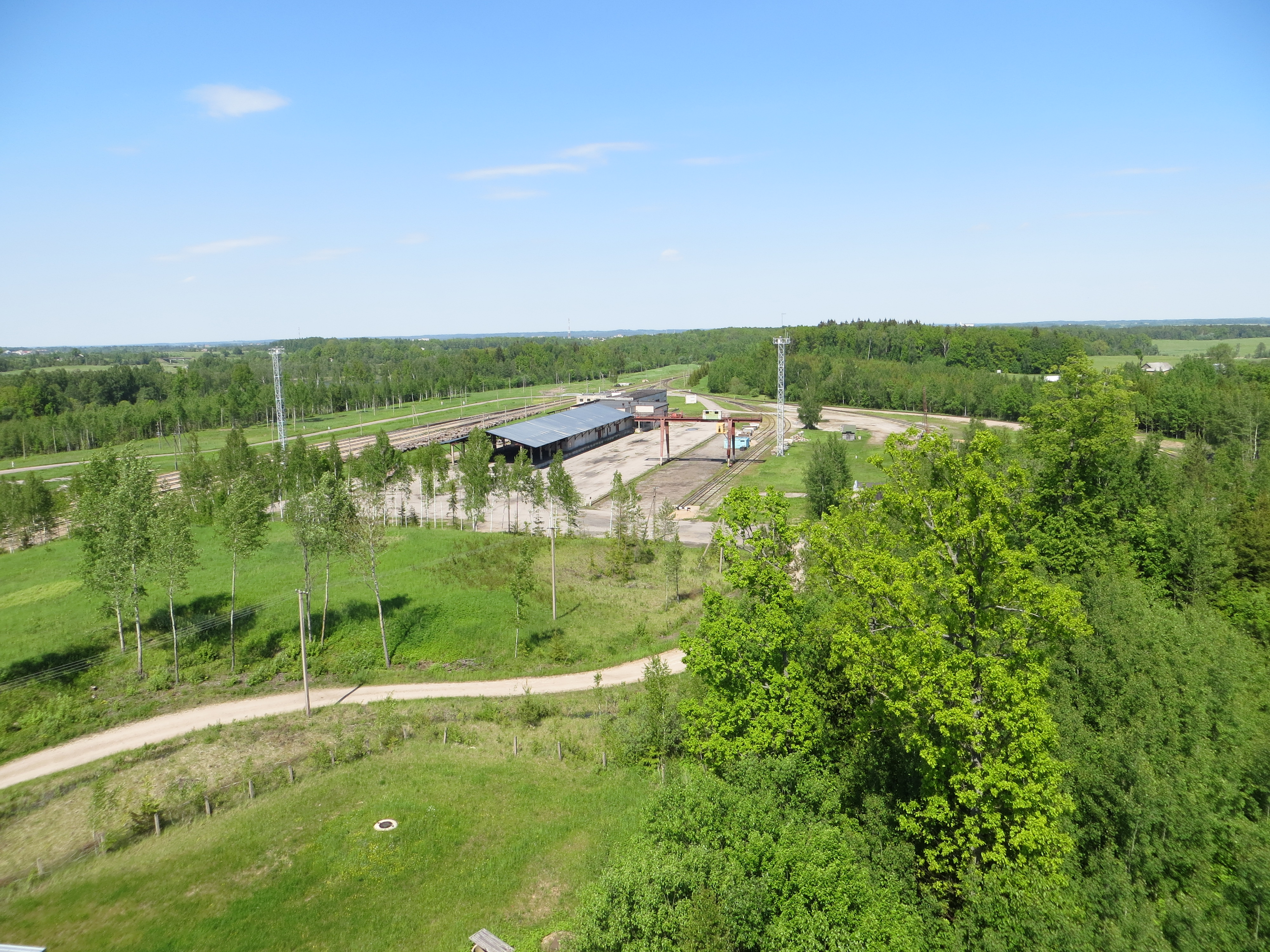 Ąžuolija 28430, Lithuania